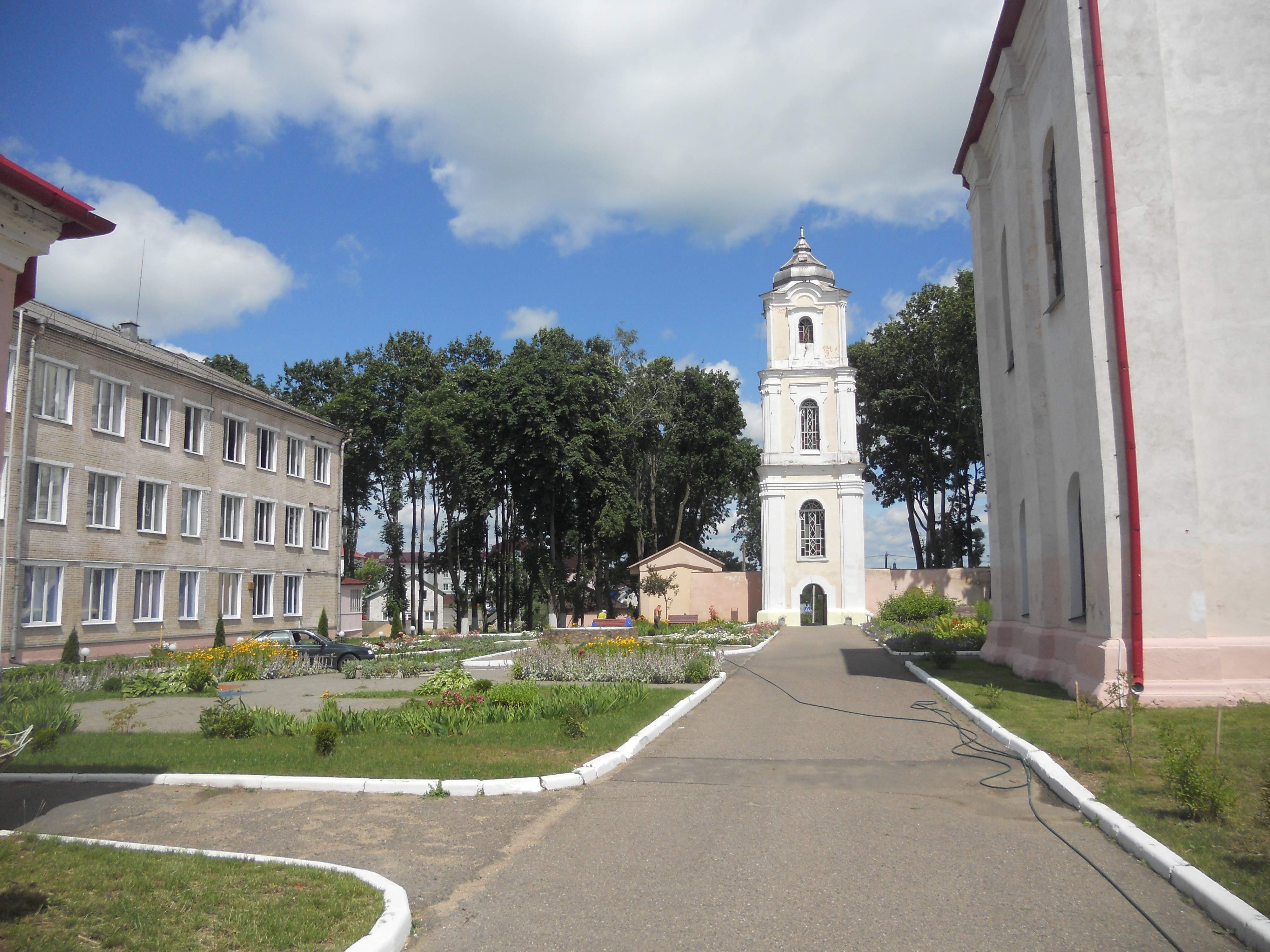 Вежа-званіца былога касцёла і кляштара бенедыктынак у Нясвіжы